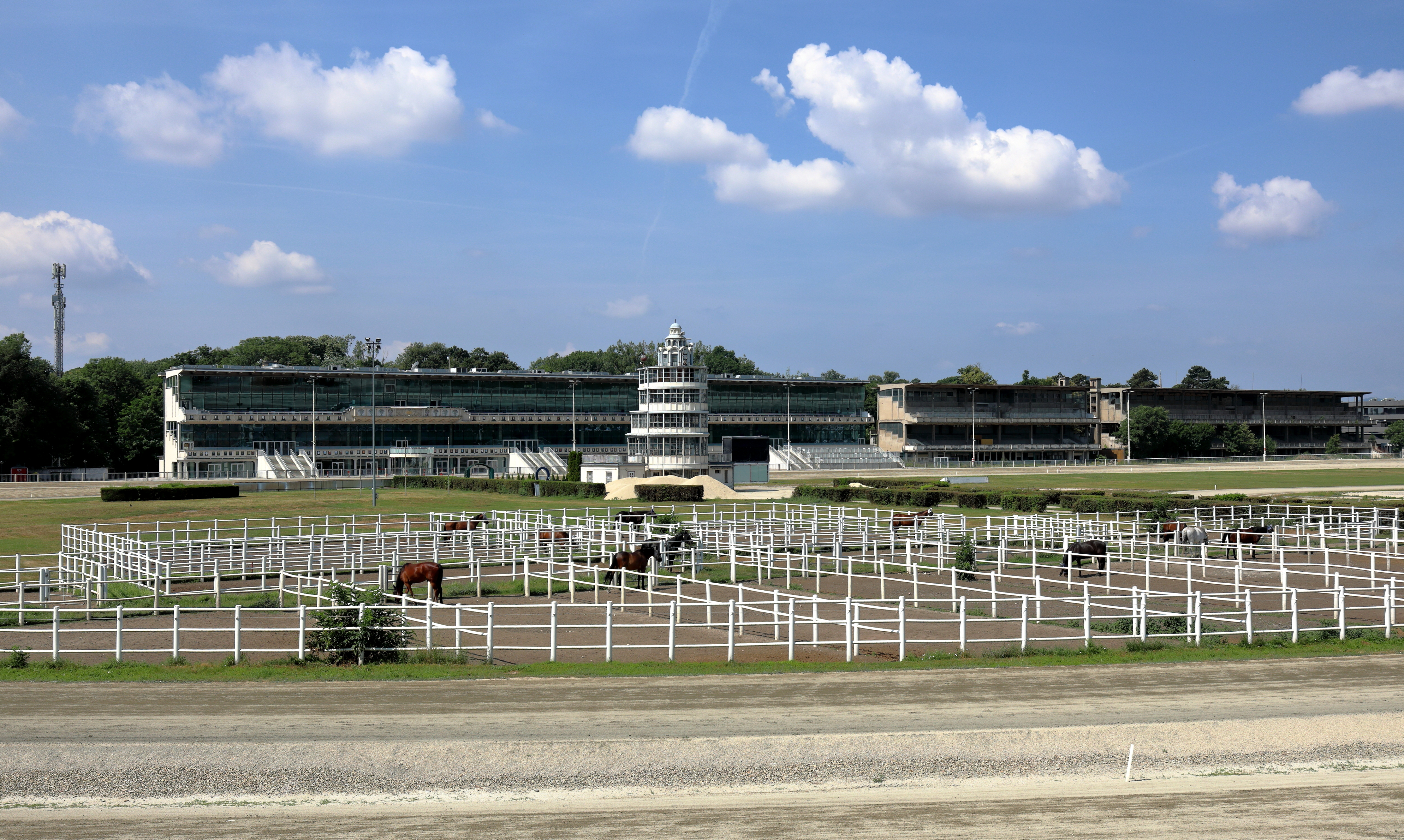 Ostnordostansicht der Trabrennbahn Krieau im 2. Wiener Bezirk Leopoldstadt.Der Trabrennplatz in der Krieau, ein Teil des Praters, wurde am 29. September 1878 eröffnet. Nachdem die ursprüngliche hölzerne Tribünenanlage in die Jahre gekommen war, wurde sie von 1912 bis 1913 durch die Architektengemeinschaft Emil Hoppe, Marcel Kammerer und Otto Schönthal erneuert. Der Zielrichterturm als letzter Bauteil wurde erst nach dem Ersten Weltkrieg im Jahr 1919 errichtet.